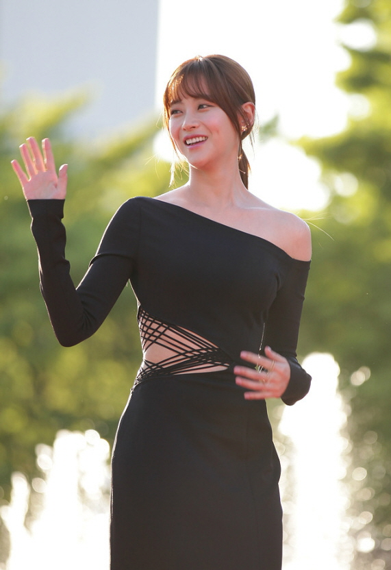 제19회 부천국제판타스틱영화제 개막식 레드카펫 part.2